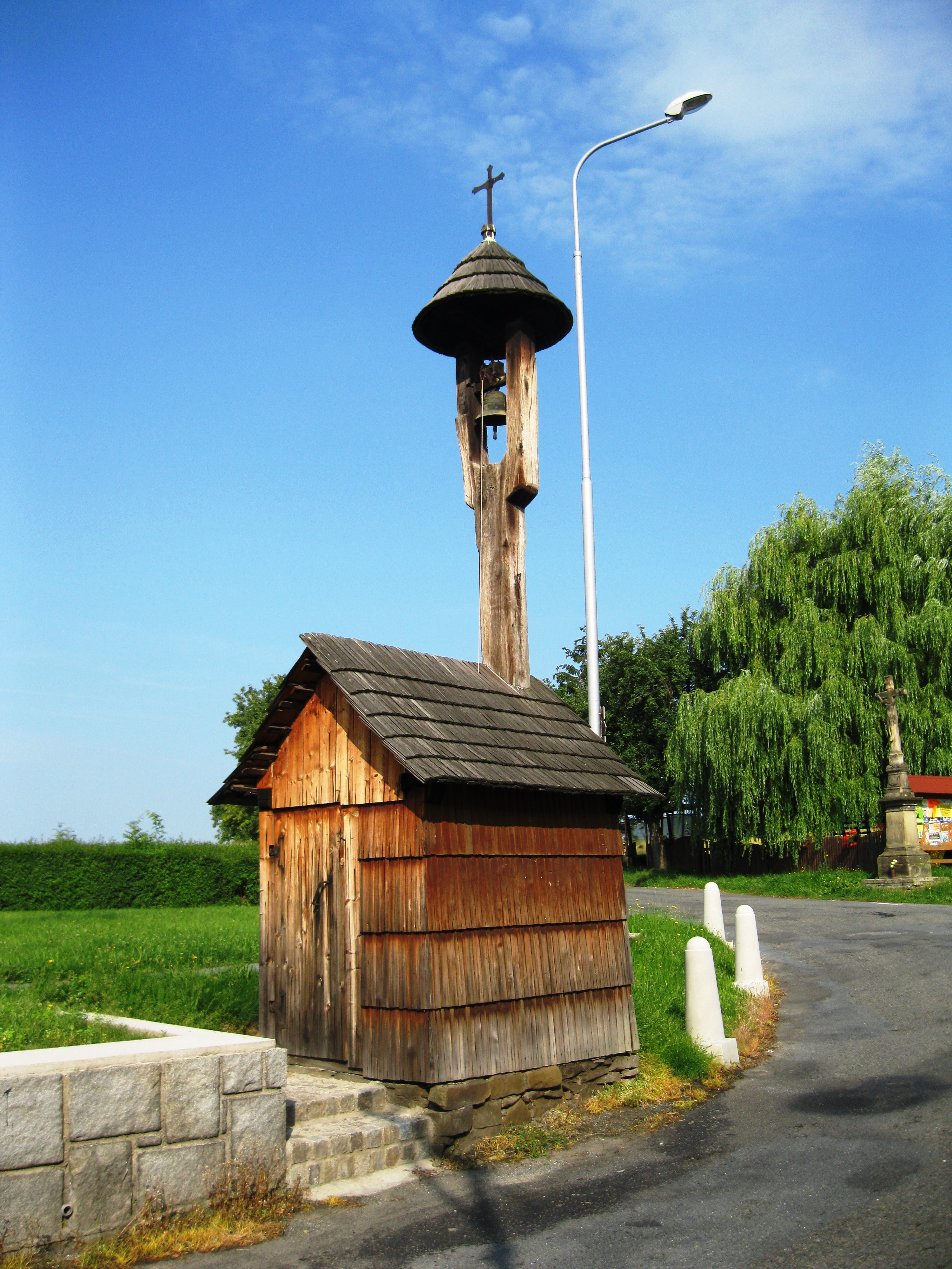 Zvonička (Zákřov), Tršice - Zákřov, proti domu čp. 7, Zákřov